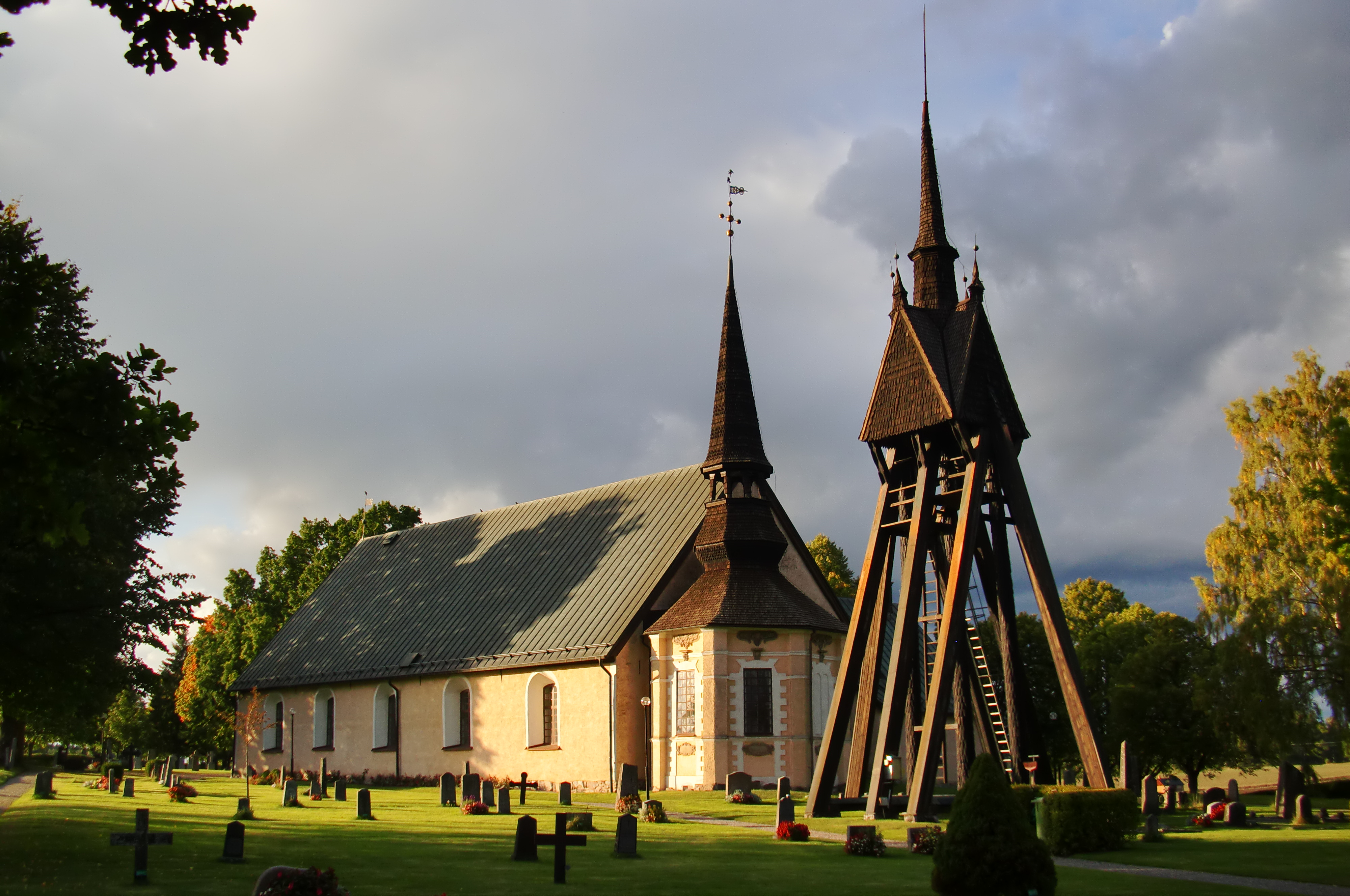 Kyrkan som uppfördes på 1100-talet tillhör Katrineholmsbygdens församling i Södermanland.